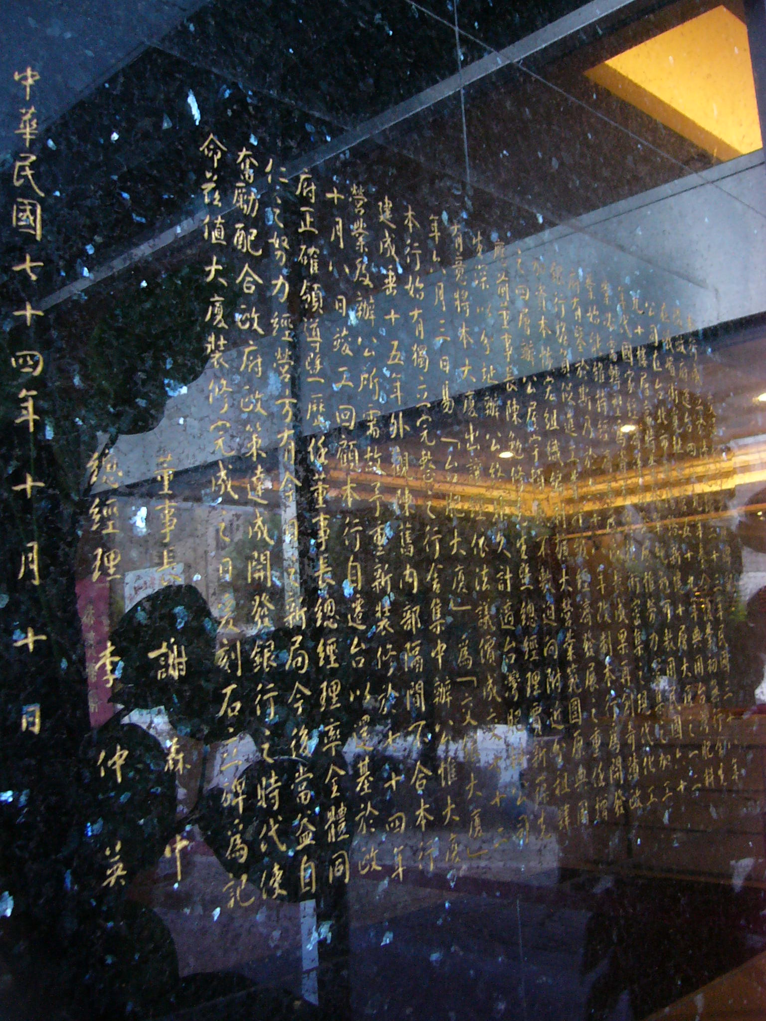 中文（台灣）: 交通銀行大廈碑記，1985年10月10日刻於交通銀行大廈（今兆豐衡陽大樓）大門。